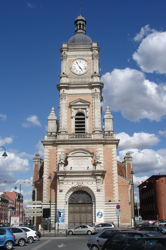 Photo prise par mes soins, il s'agit de l'église de Lens 62300 France